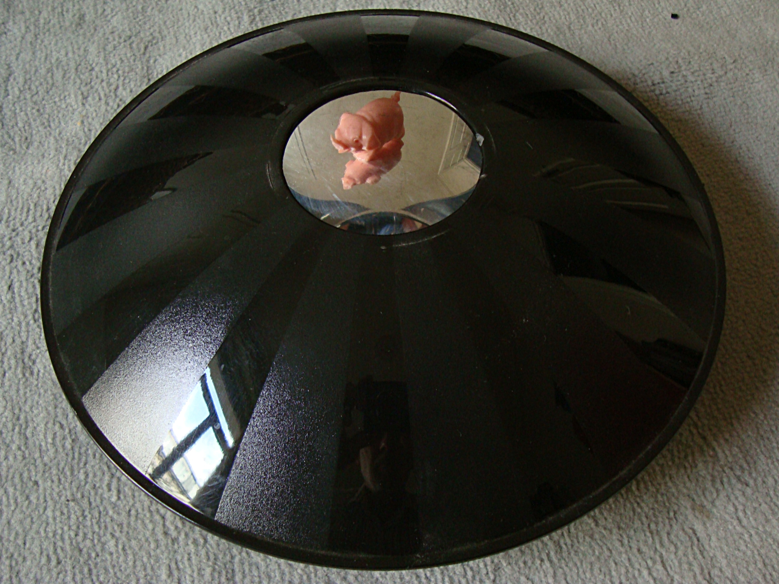 Dispositif opposant deux miroirs paraboliques : l'image du cochon, placé au centre du miroir inférieur, apparaît juste au dessus de l'ouverture pratiquée dans le miroir supérieur.